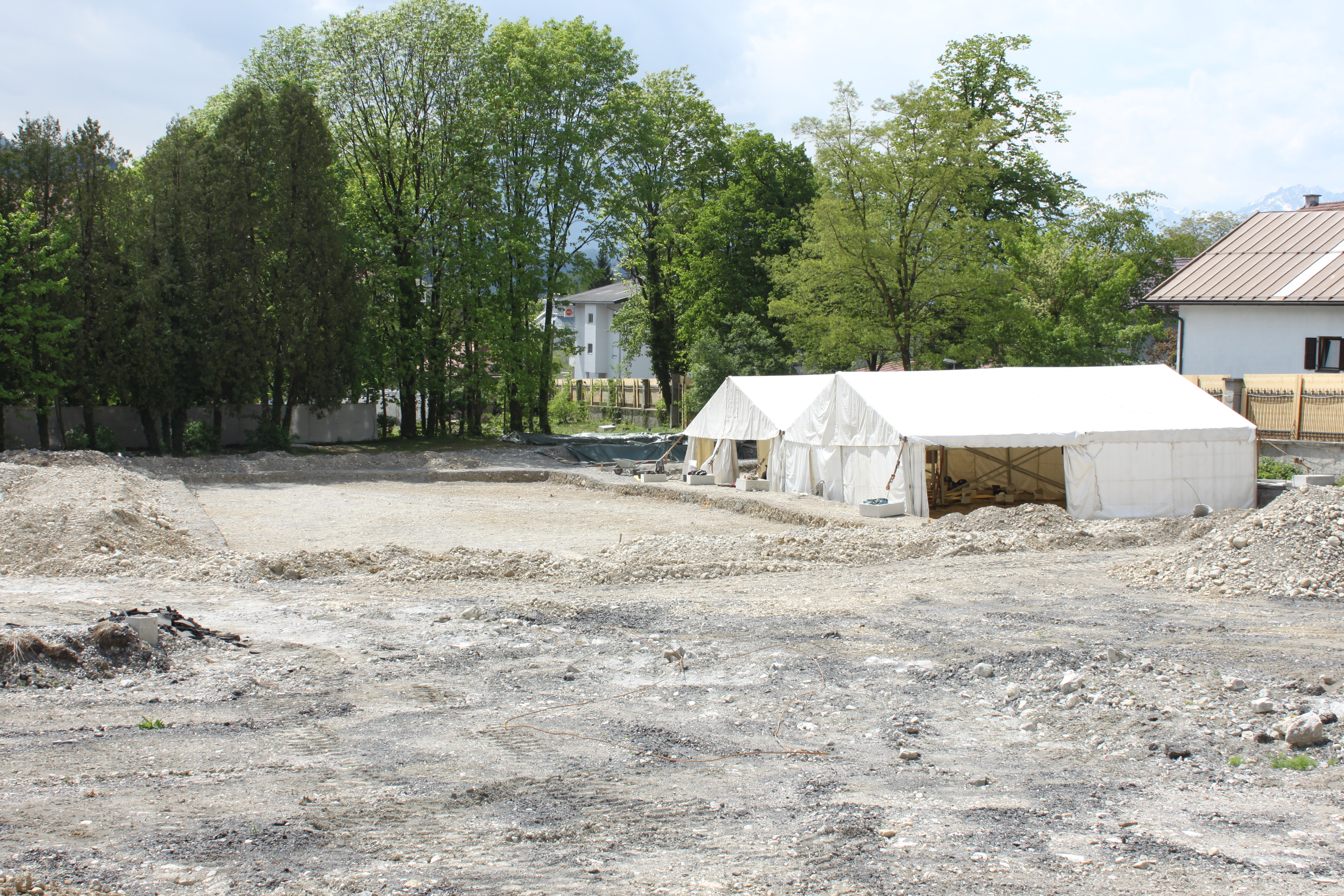 Ehemaliger Friedhof in der öffentlichen Sonderkrankenanstalt Psychiatrisches Krankenhaus Hall in Tirol, nach Google Geo in der Ecke Thurnfeldgasse und Kaiser-Max-Straße, Vornutzung laut Google Geo als asphaltierter Autoabstellplatz des Krankenhauses, Fotografstandpunkt in Kaiser-Max-Straße mit Blickrichtung Süden, GEO 47.286100,11.512600